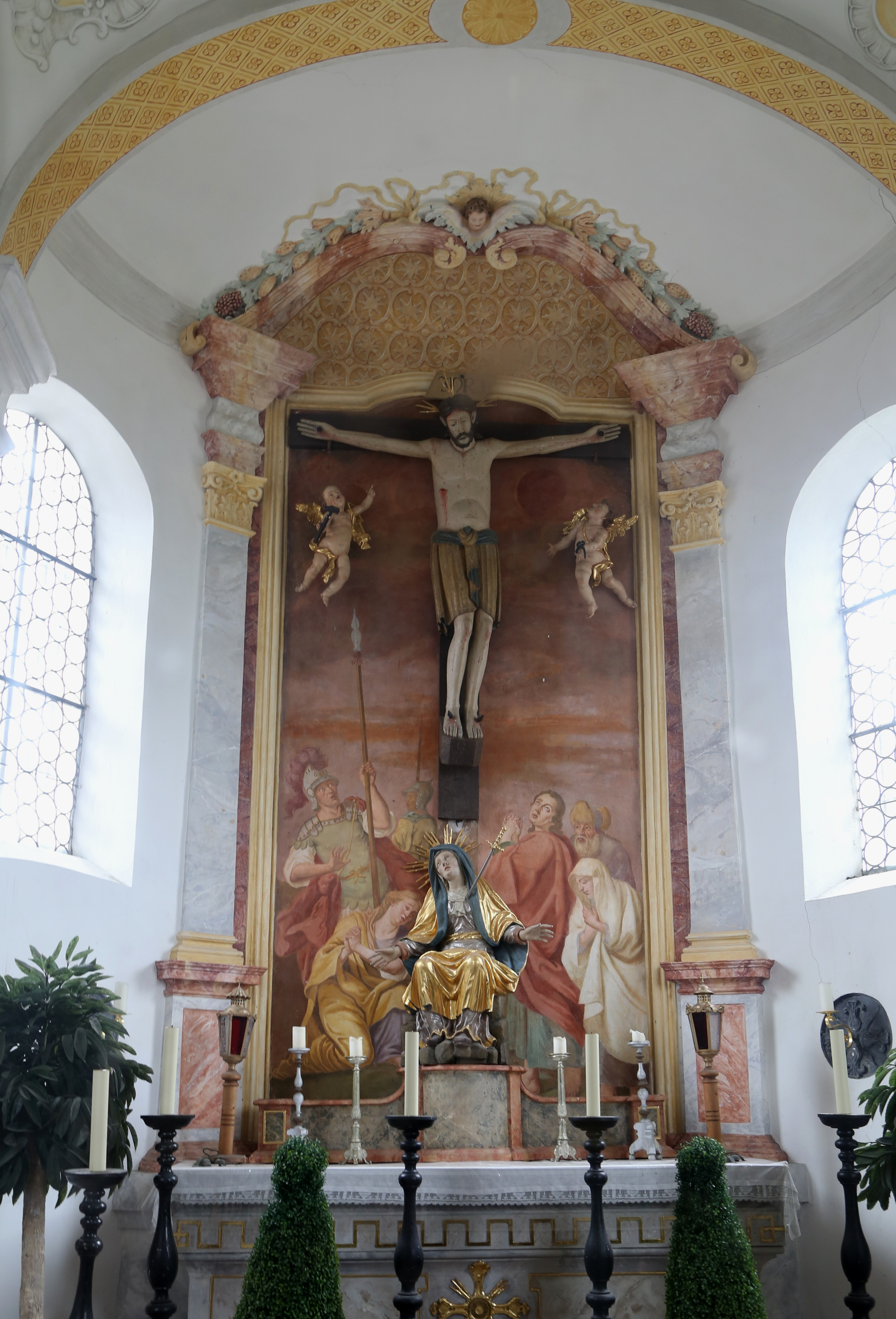 Kocheler Straße 15; Friedhofskapelle Heiliges Kreuz, barocker vierkonchiger Zentralbau mit Zwiebelturm, 1693; mit Ausstattung